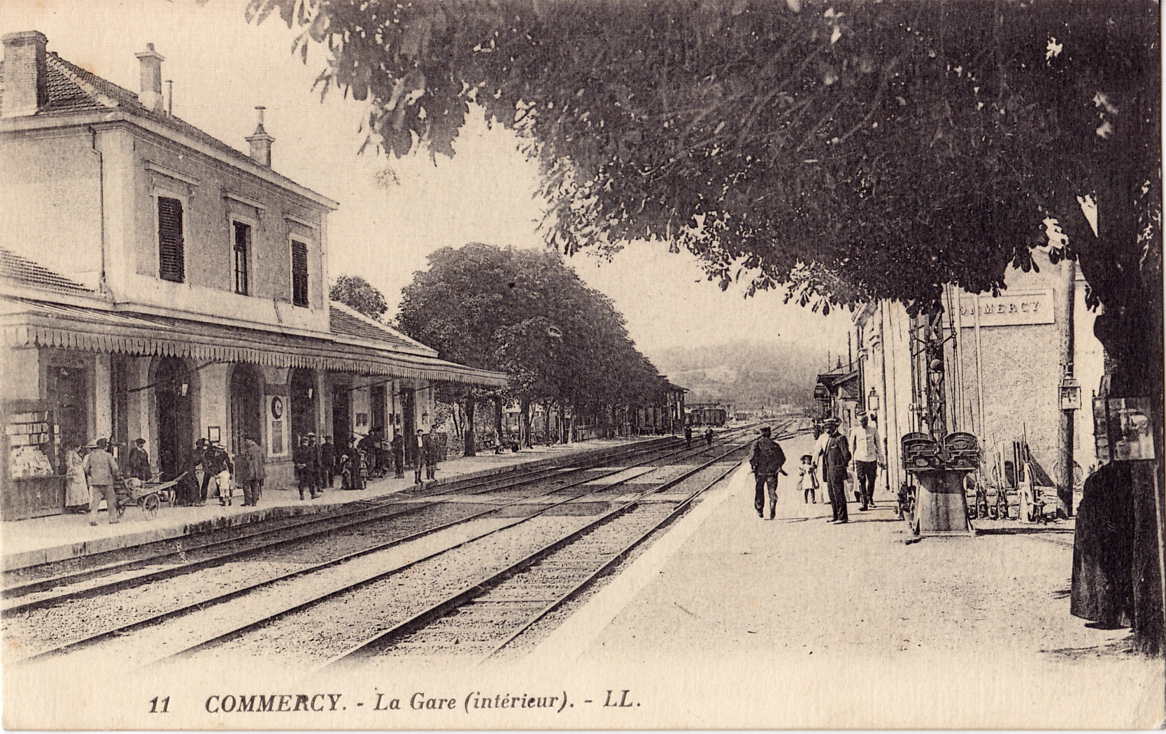 Carte postale ancienne éditée par LL, n°11 : COMMERCY - La Gare (intérieur)